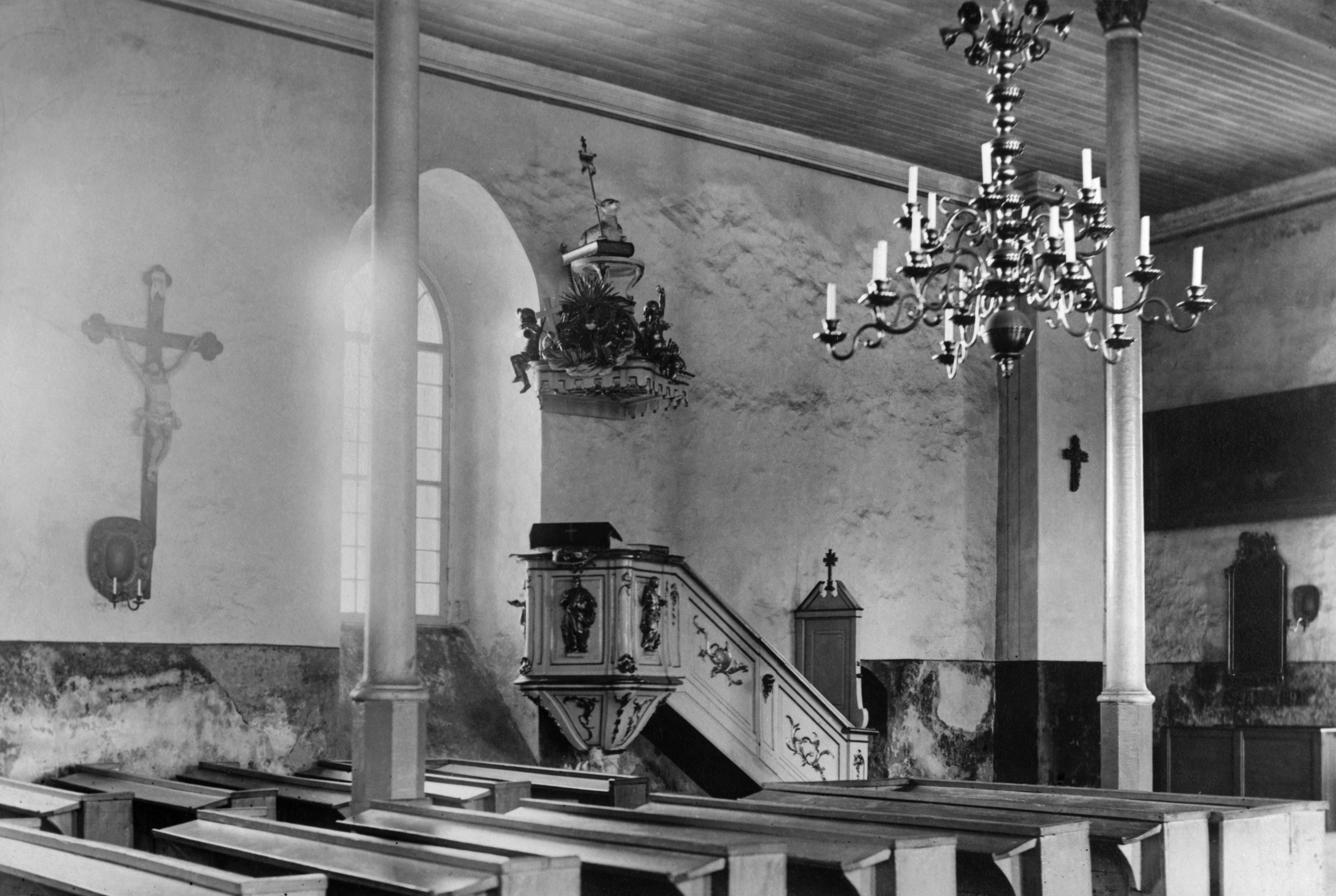 Интерьер кирхи в деревне Молосковицы.